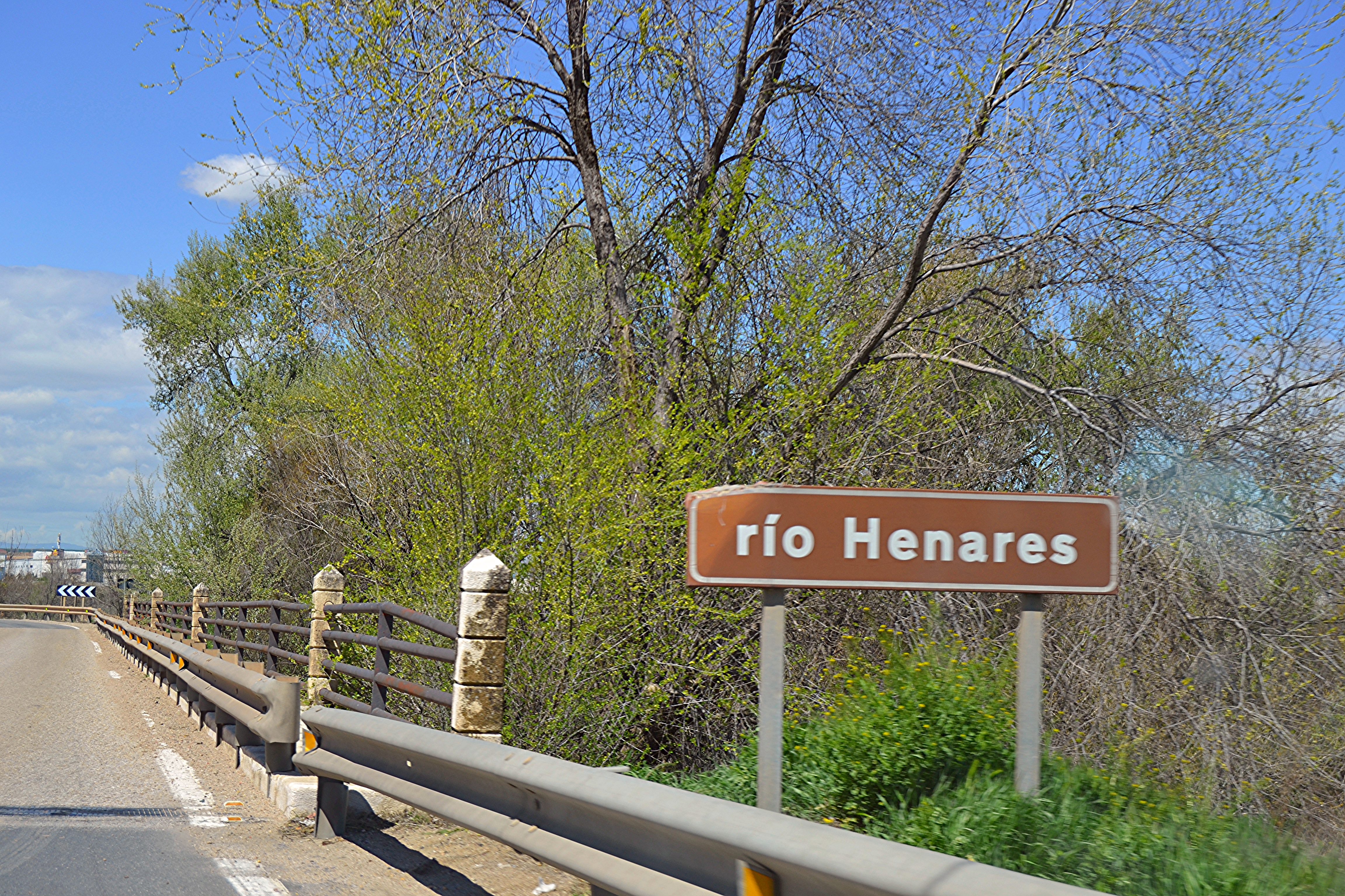 Río Henares